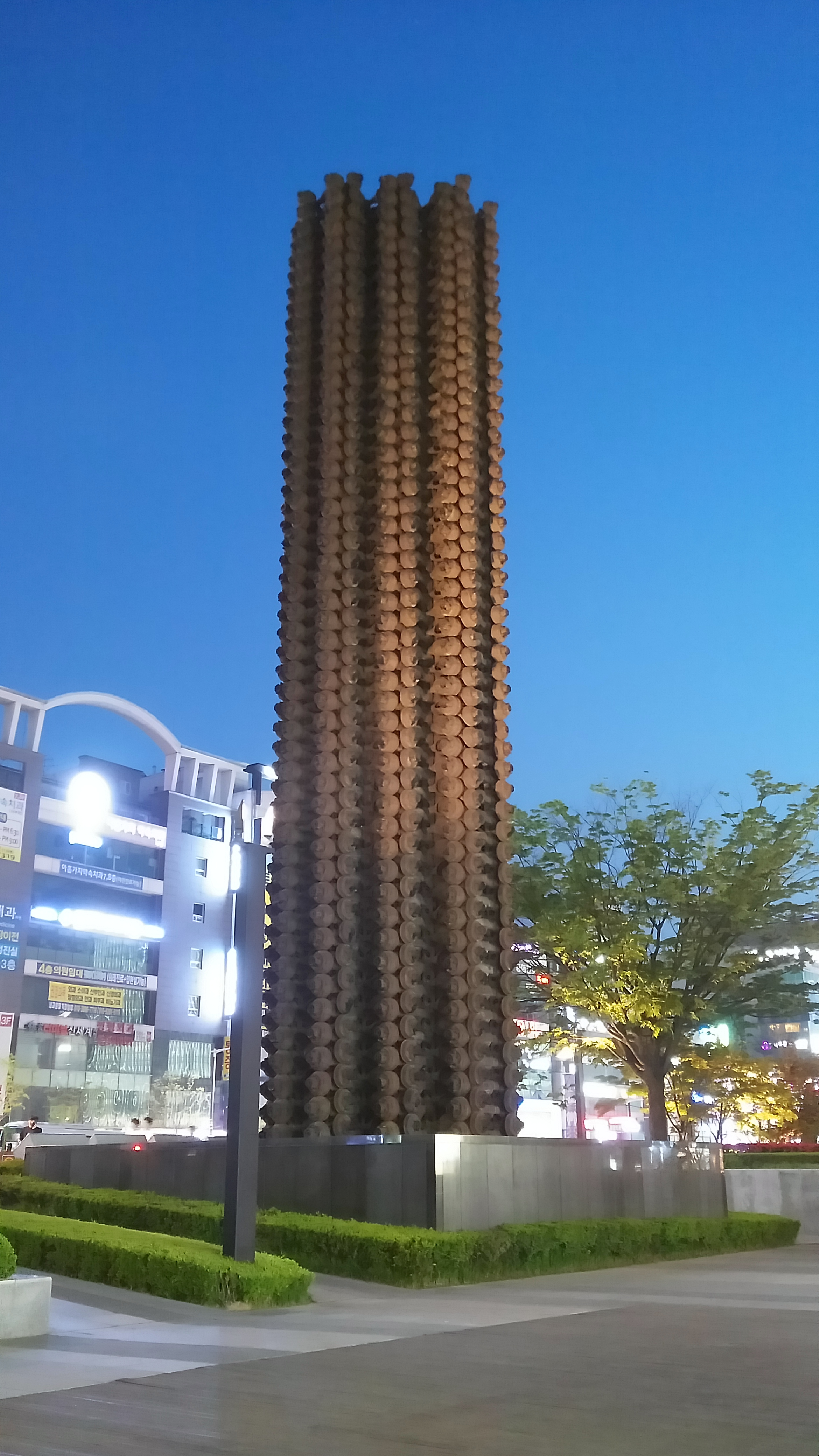 조각가 ‘아르망’이 999개 차축으로 만든 ‘수백만 마일’